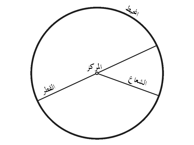 صورة دائرة